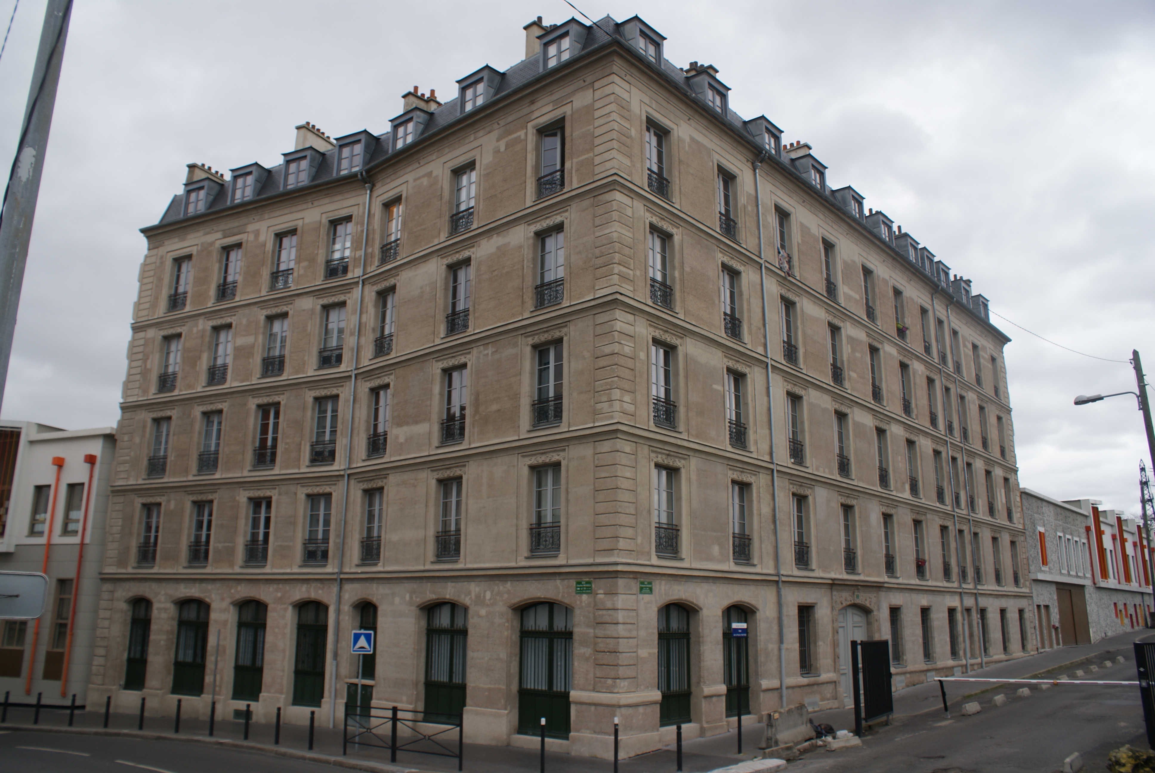 La Maison de logement des ouvriers de l'usine Coignet rénovée, vue en 2020.